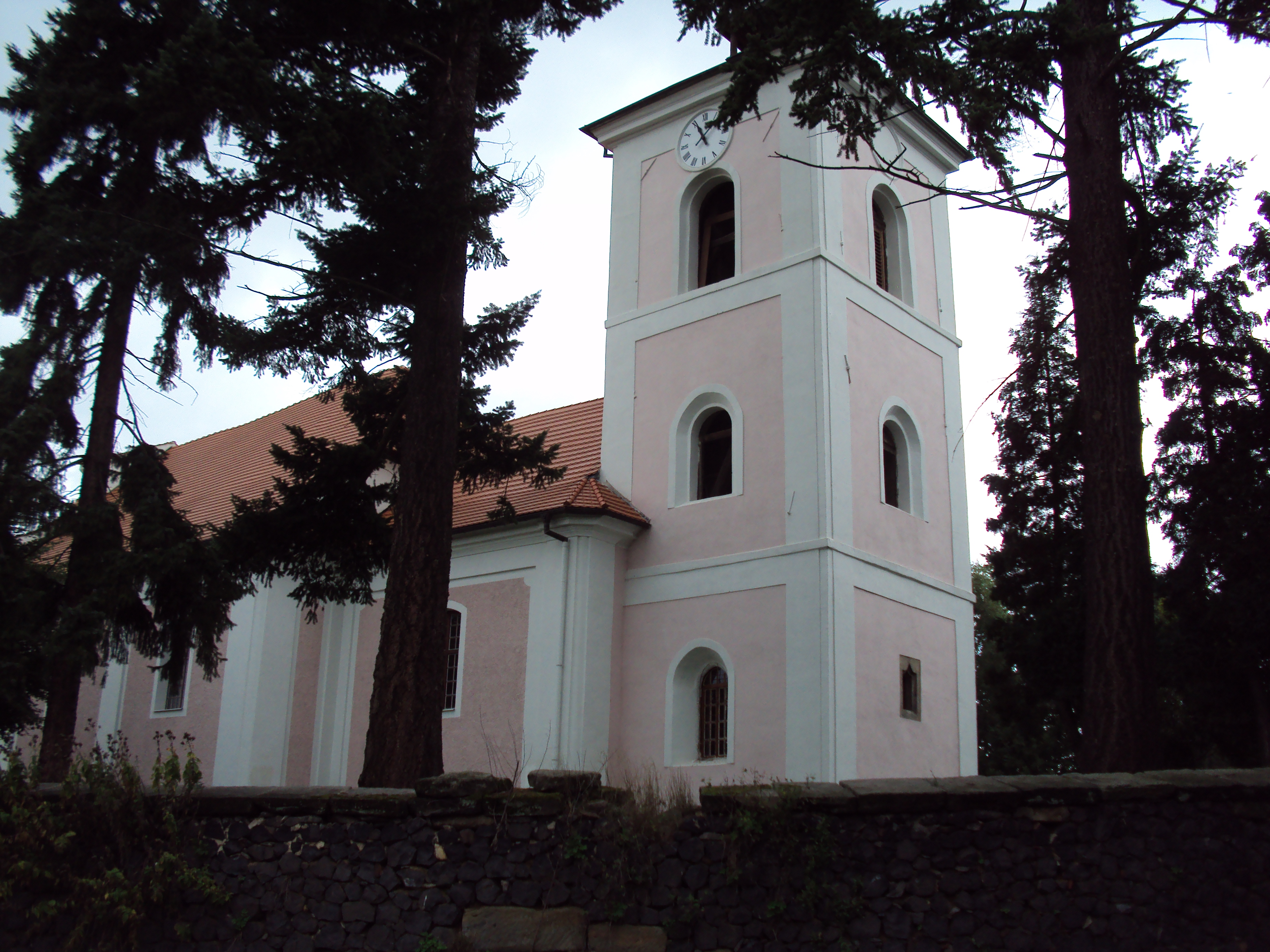 Kostel sv.Jakuba uzamčený za branou hřbitova v Horní Libchavě